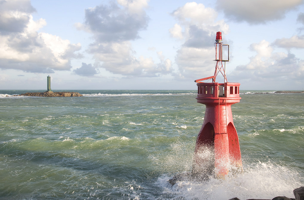 Farolete Baixinha (front right) / Farol do Recife de Natal (top left), Natal, Rio Grande do Norte, Brasil